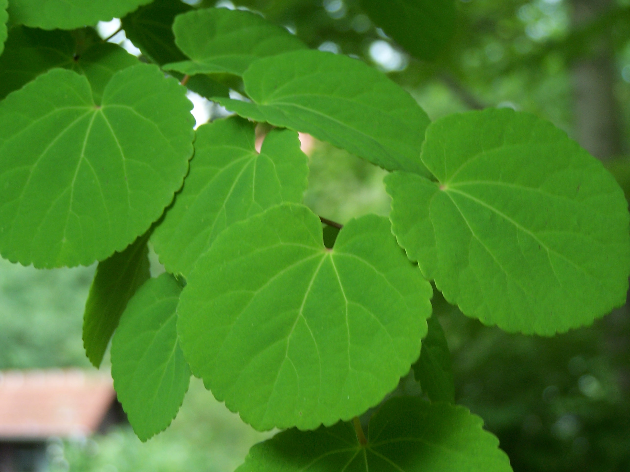 Cercidiphyllum japonicum 17 juin 2006 Vieux jardin botanique de Göttingen